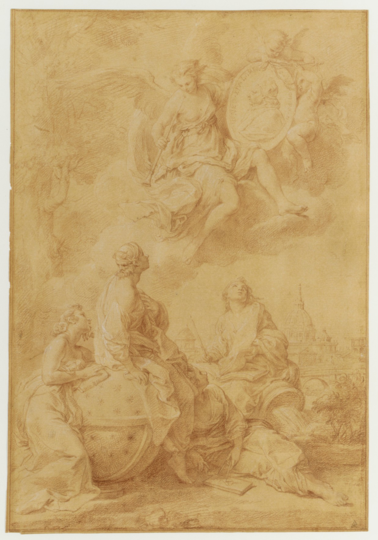 Drawing; Drawings